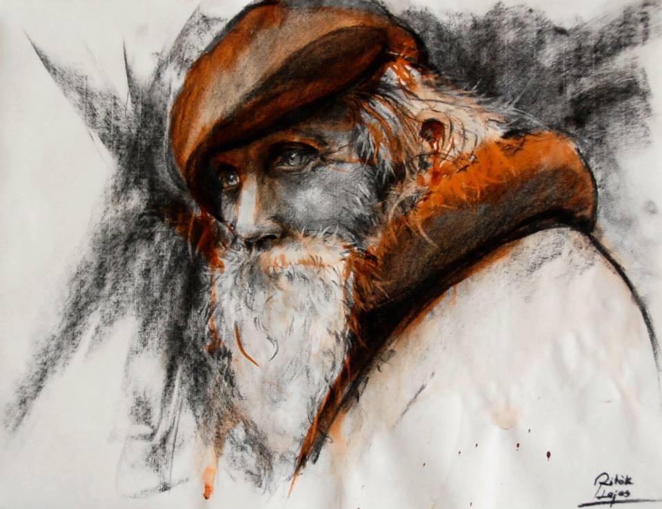 szénportré